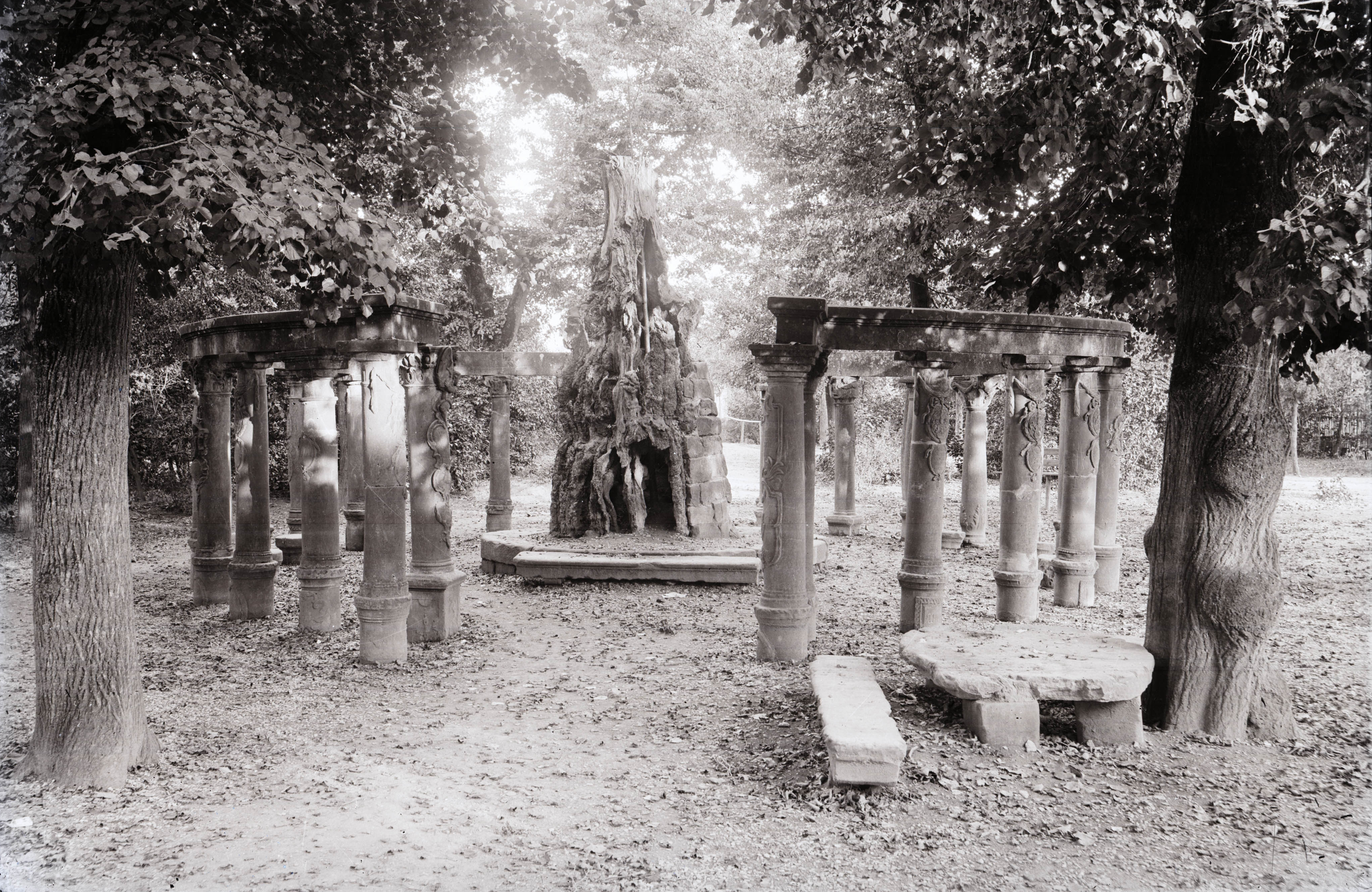 Die abgestorbene Gerichtslinde auf dem Lindenplatz in Weinsberg. Der Säulenkranz stützte einst die Äste der Linde.